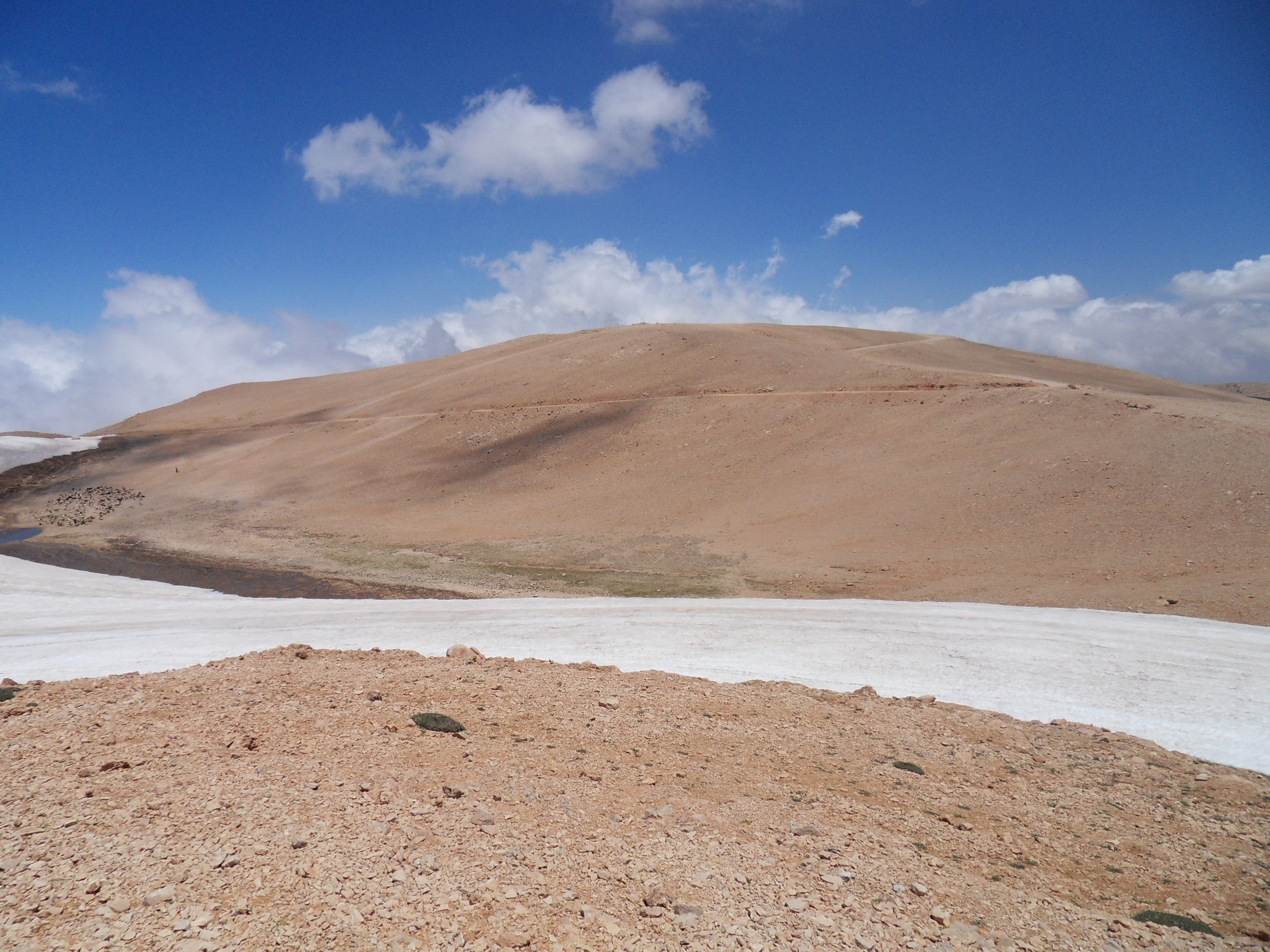 Vue d'un sommet en face côté sud en partant de la station de ski "Les Cèdres"